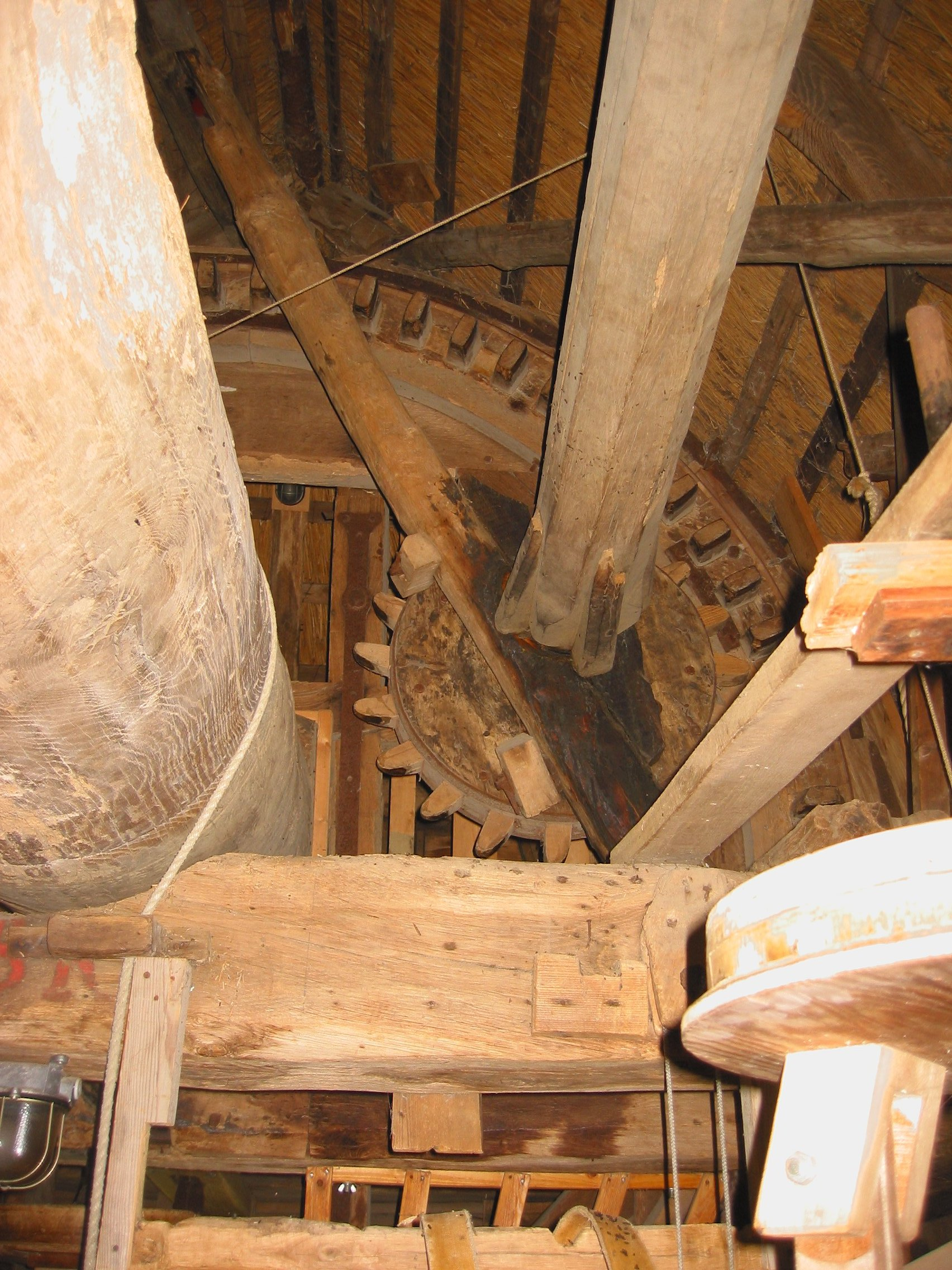 (nl: Doesburger molen bovenas, Ede, Nederland